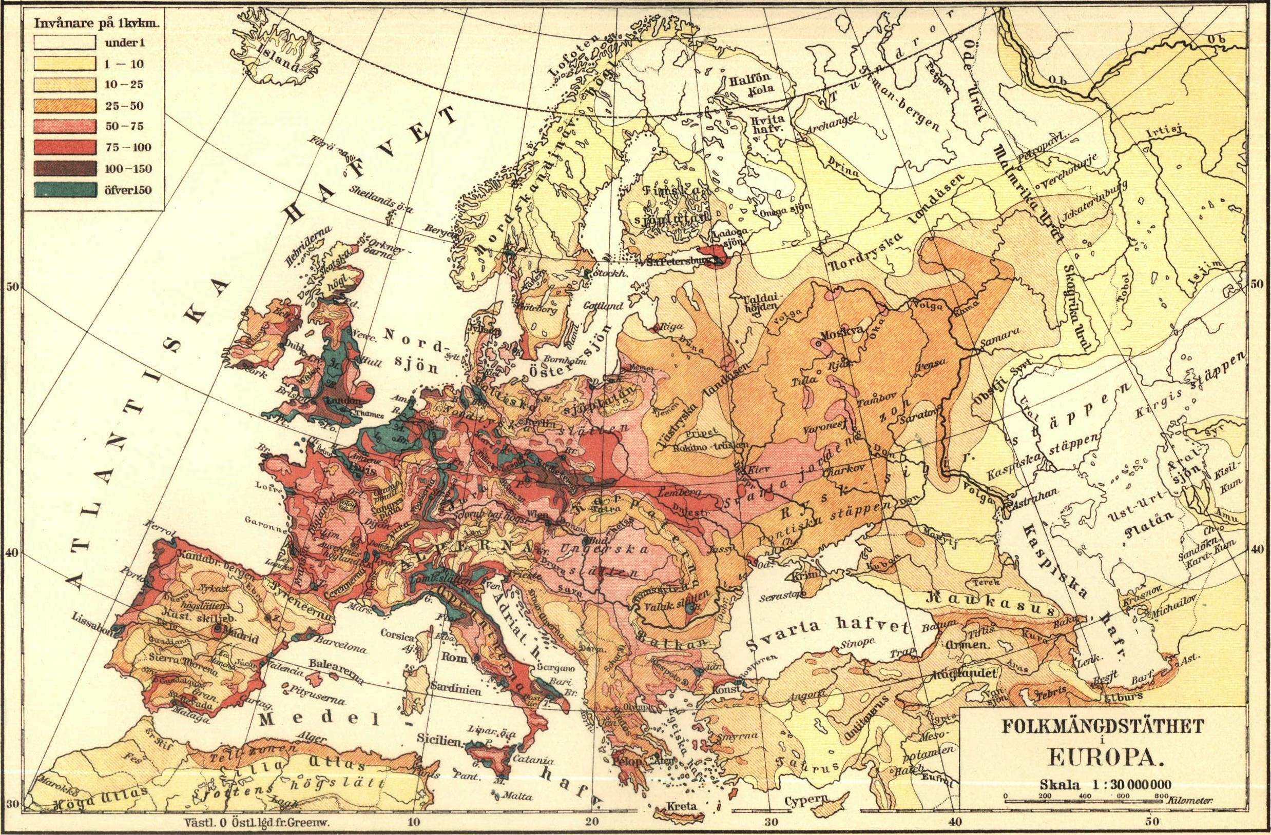 Folkmängdstäthet i Europa.